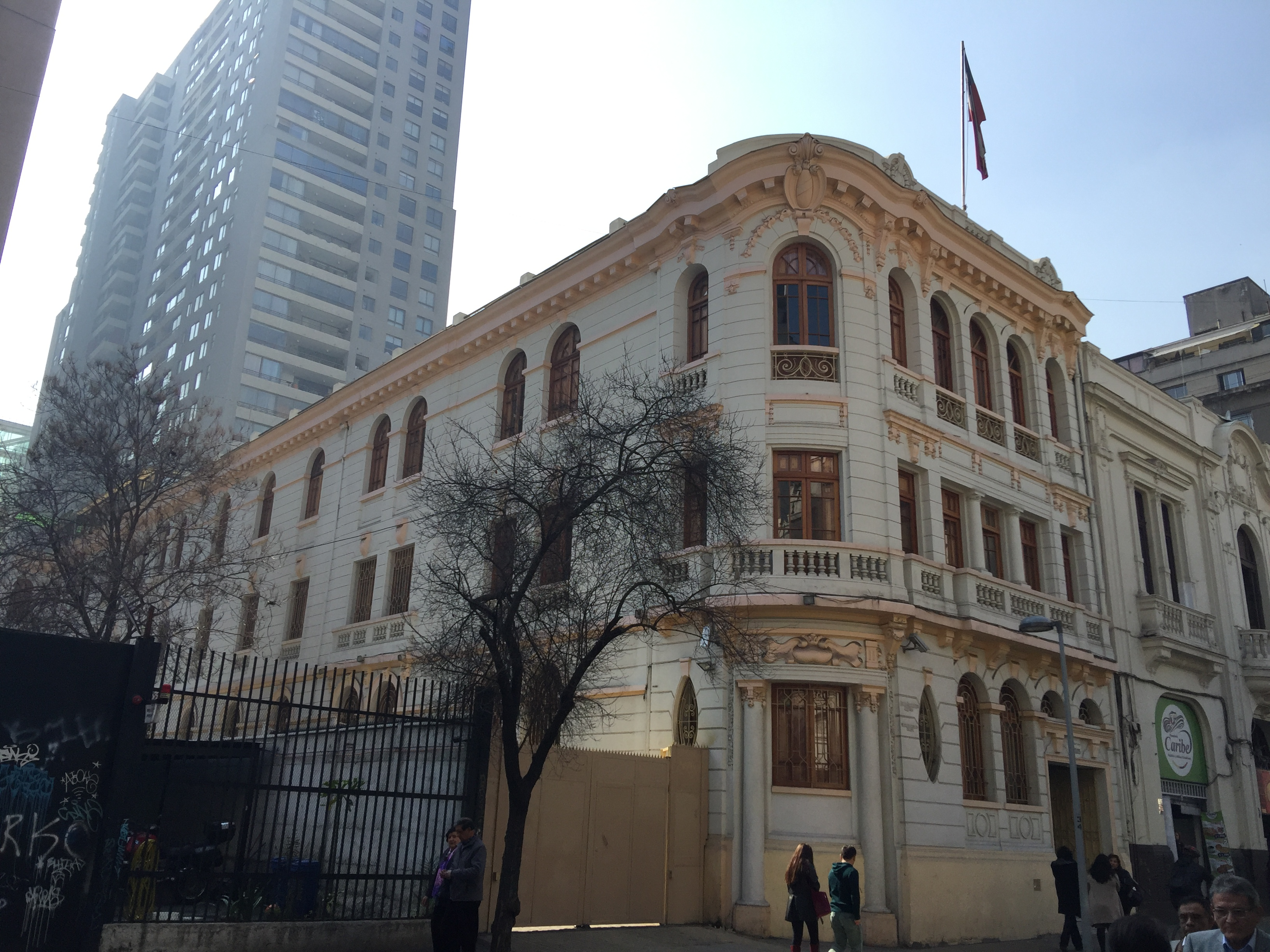 Obra de Salvador Vásquez, diseñada por Emilio Santelices. Actualmente en alberga dependencias de la Corporación Administrativa del Poder Judicial de Chile